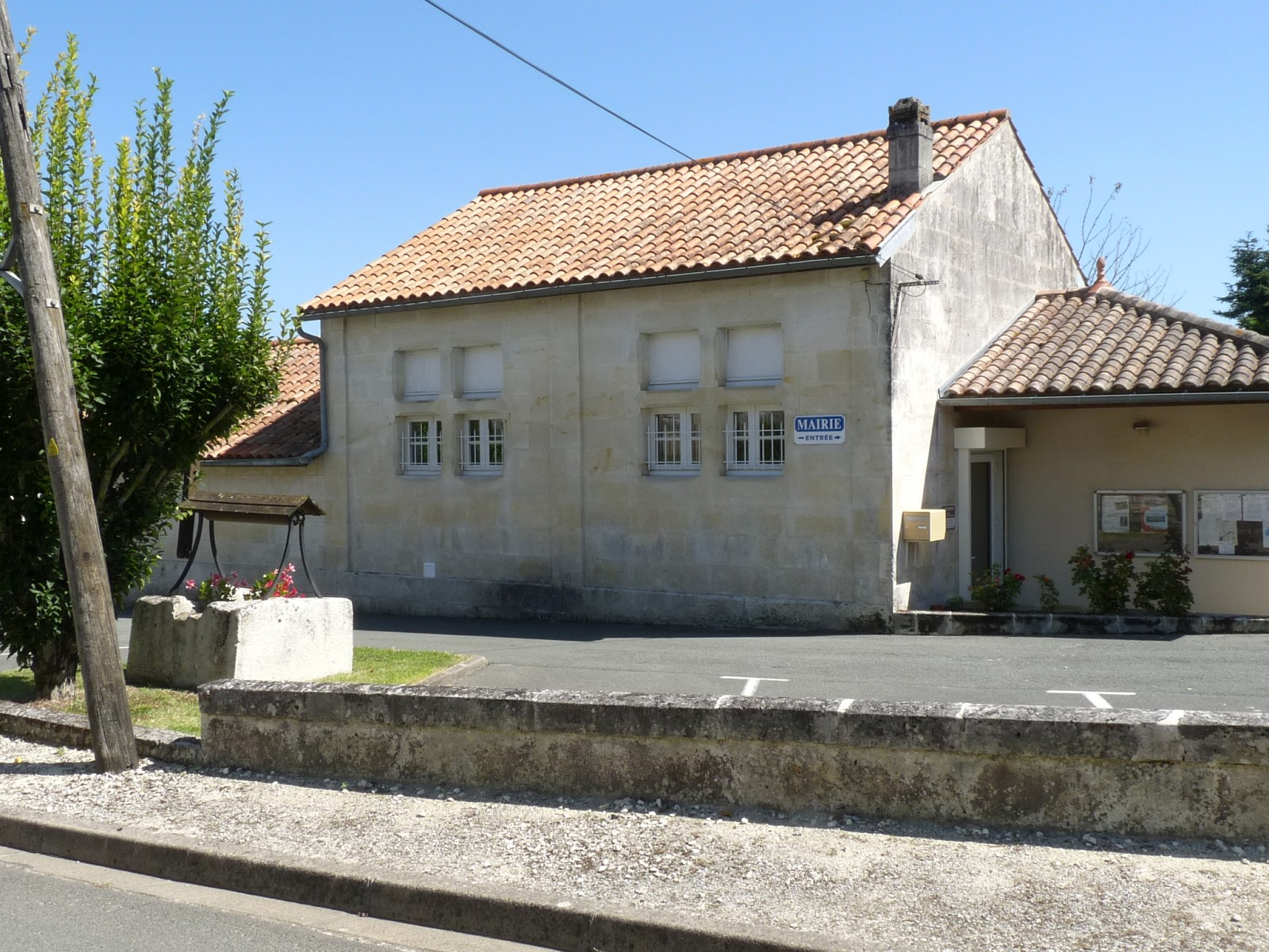 Mairie de Marignac, Charente-Maritime, France